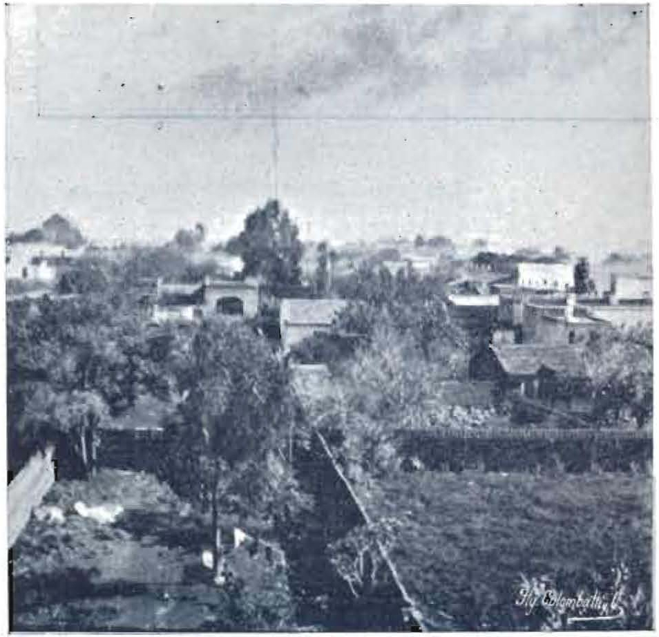 Rocha en 1900